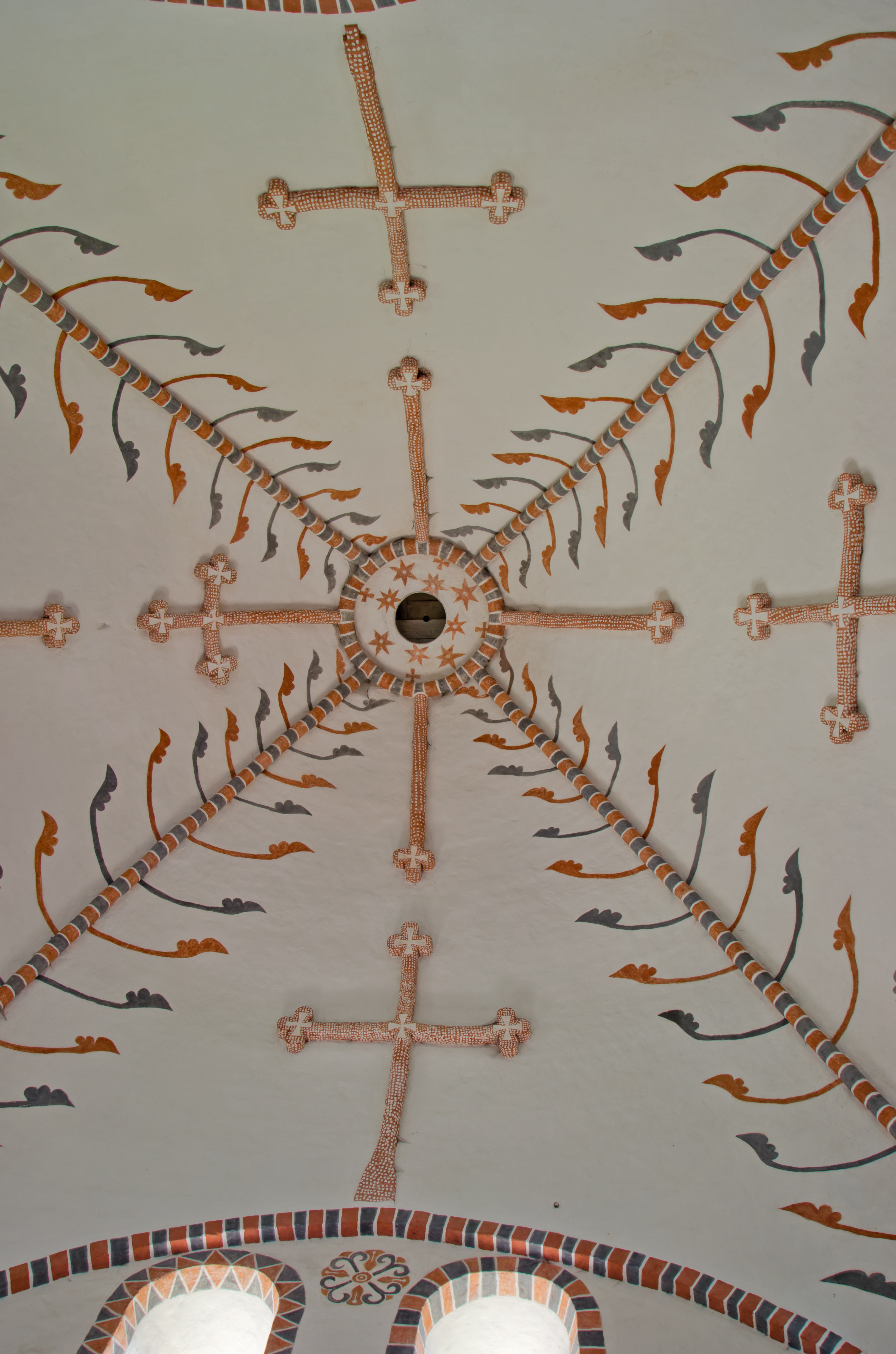 Kavelstorf - Kirche Chordecke